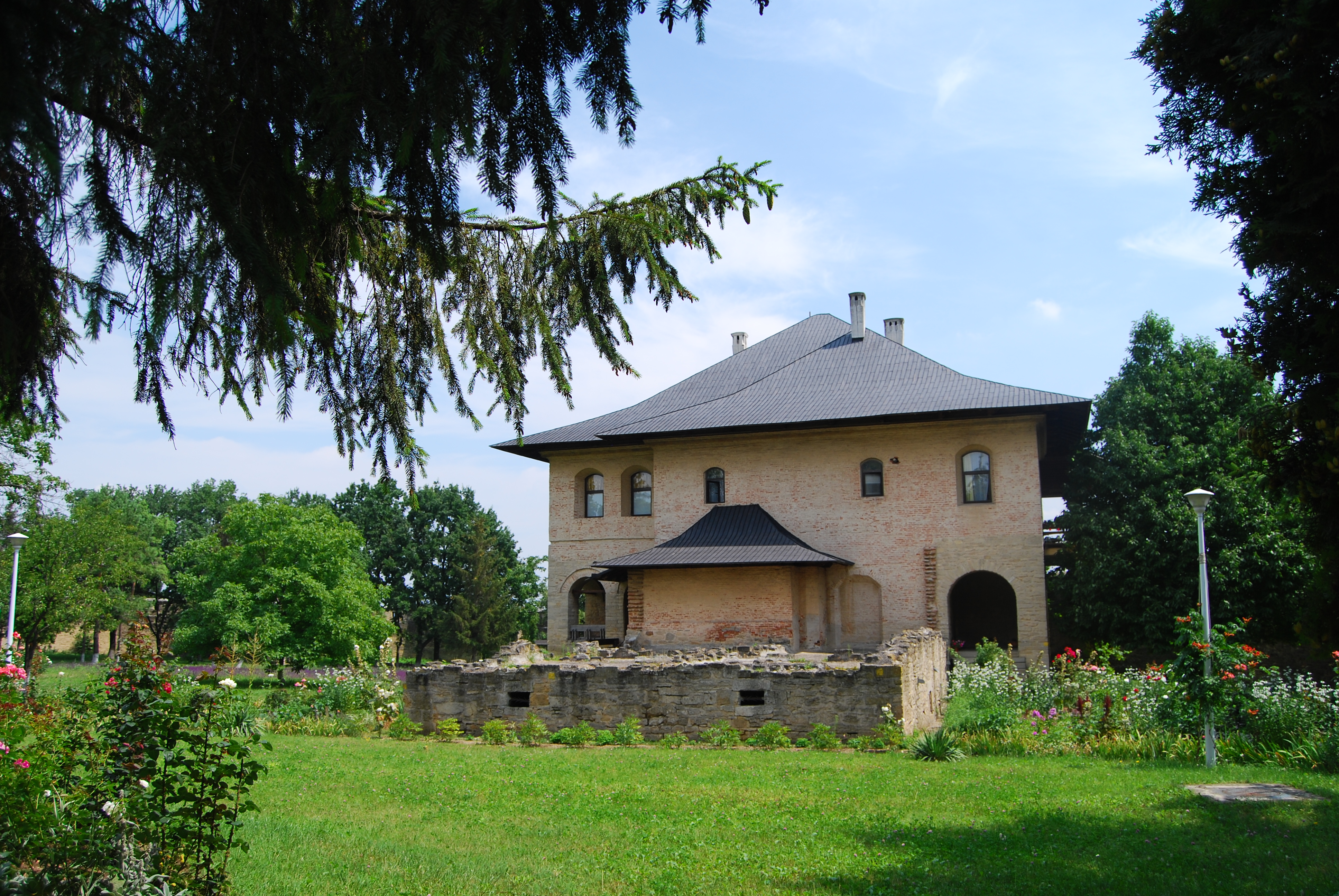 Palat domnesc 02